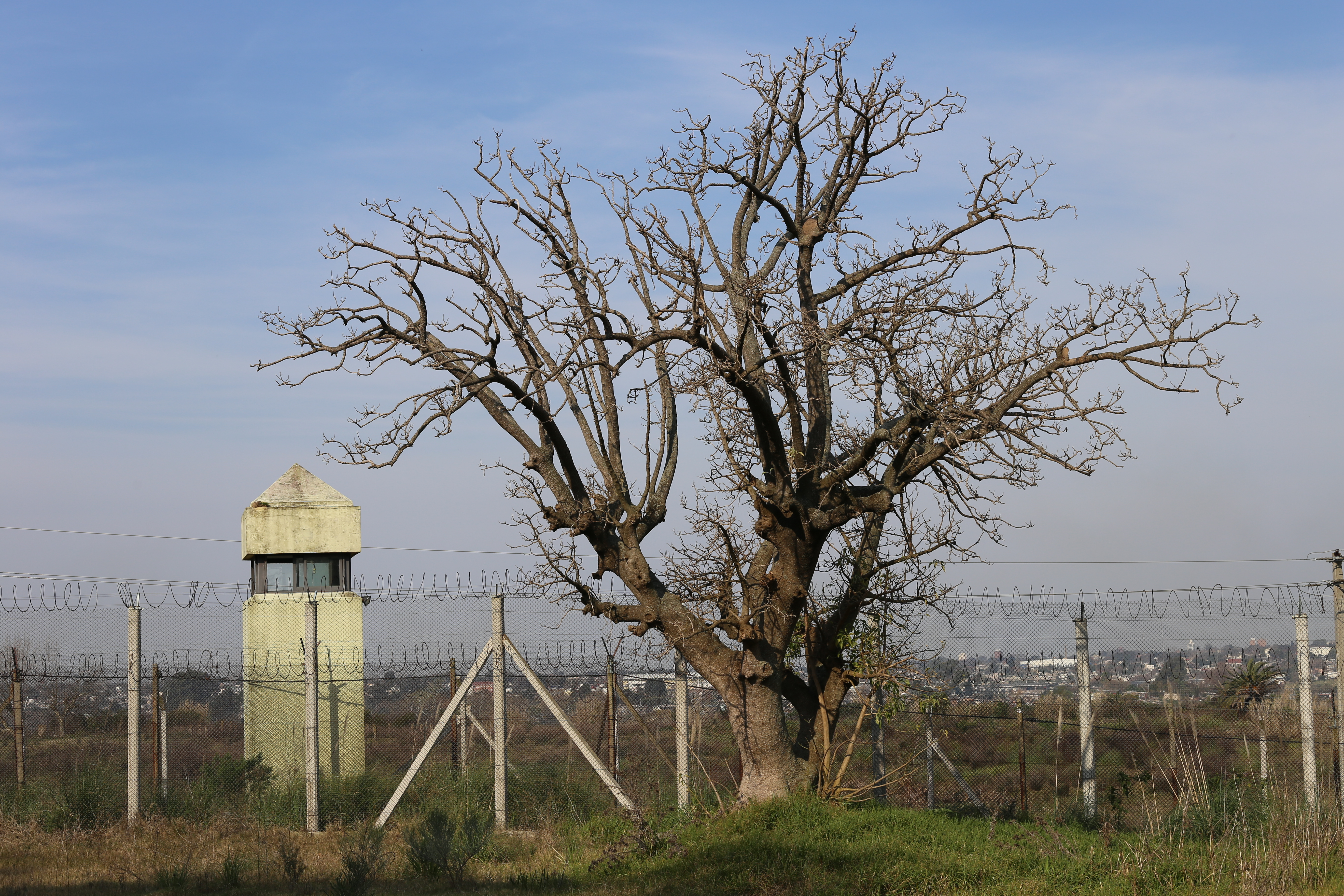 Fotografía del ex centro de detención y tortura La Tablada, que funcionó durante la dictadura cívico militar uruguaya.